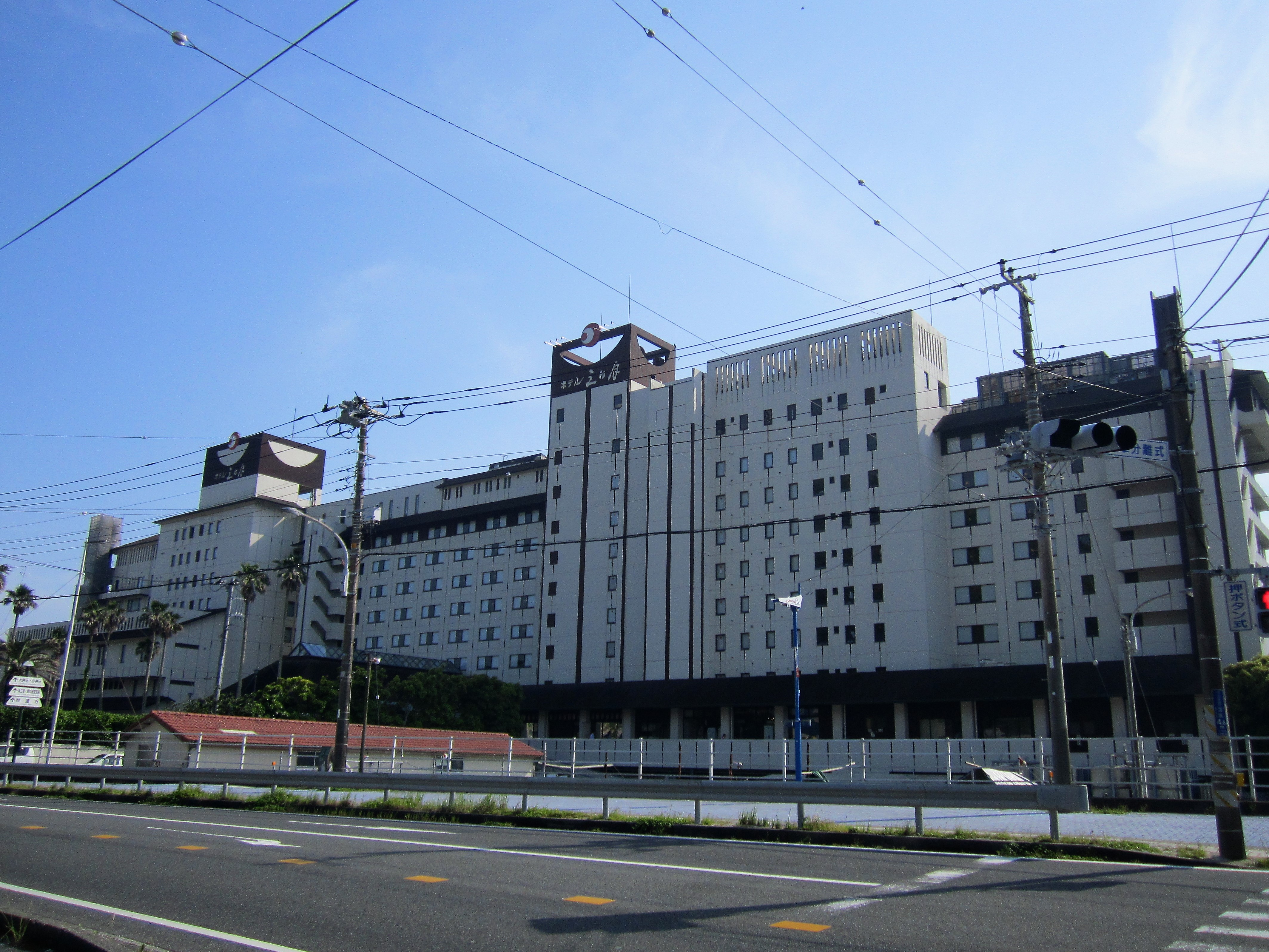 鴨川ホテル三日月（鴨川市内浦）